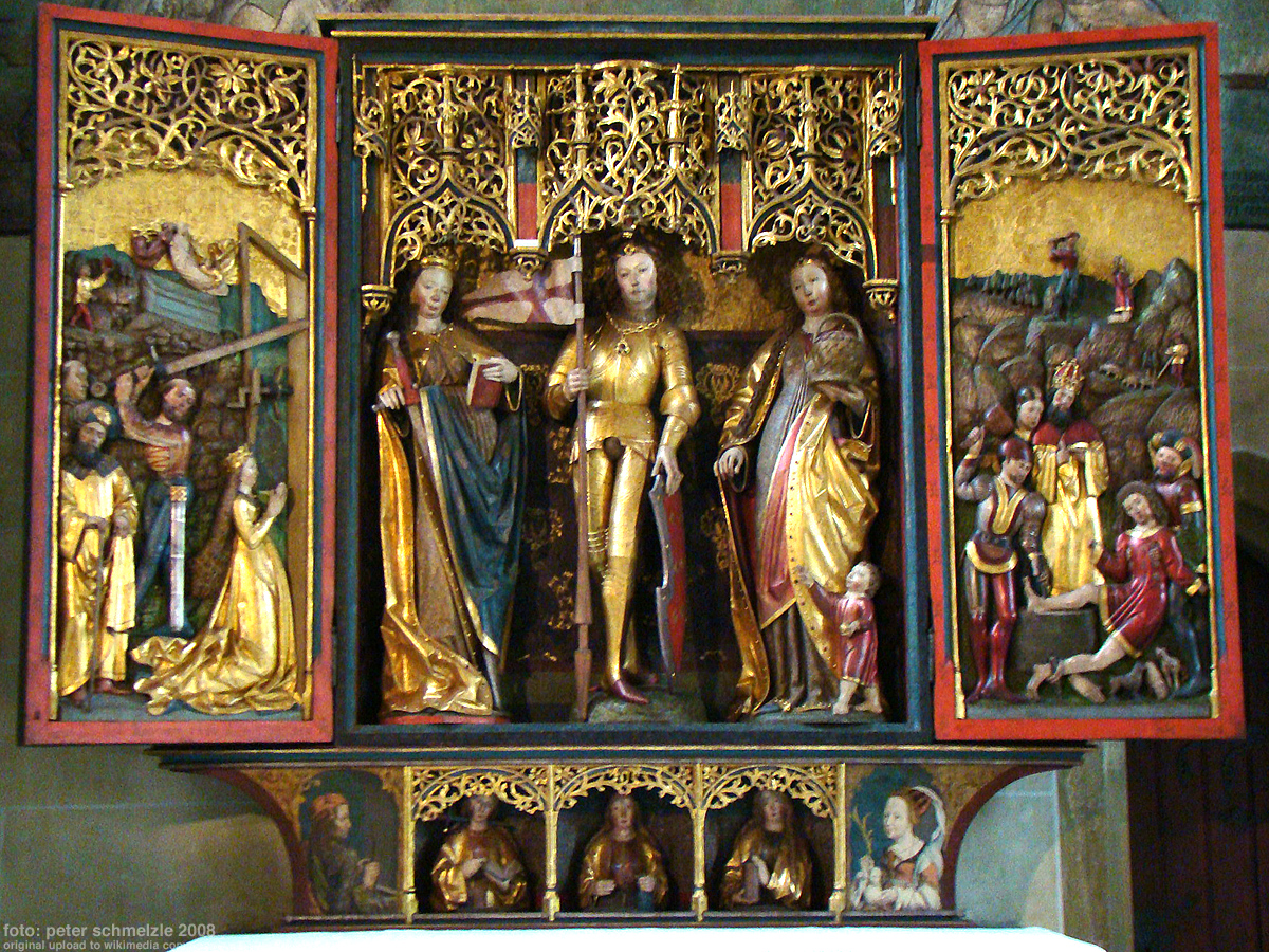 Seitenaltar der Stadtkirche Bad Wimpfen